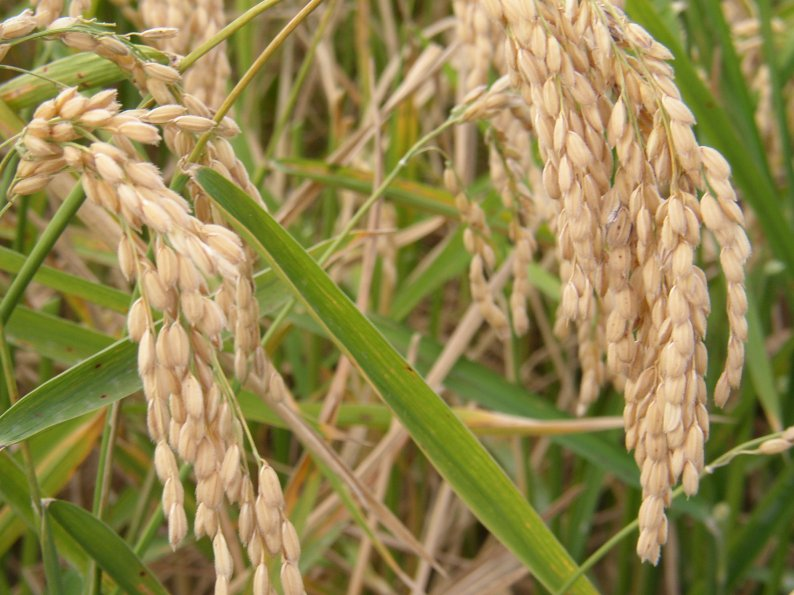 Espiga de arroz. Fotografía realizada el 21 setiembre de 2003 por el autor Usuario:Pelayo2.